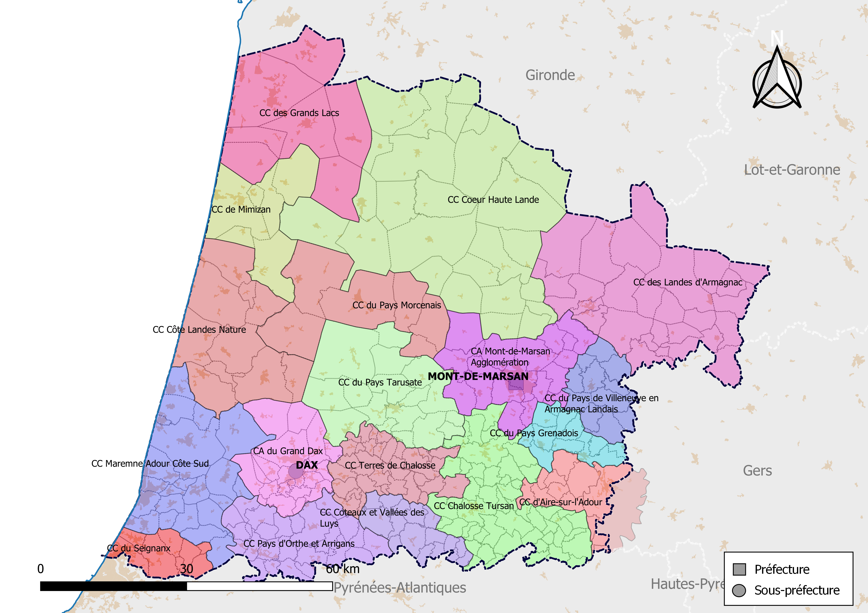 Carte des intercommunalités du département des Landes, France. Composition au 1er janvier 2019.